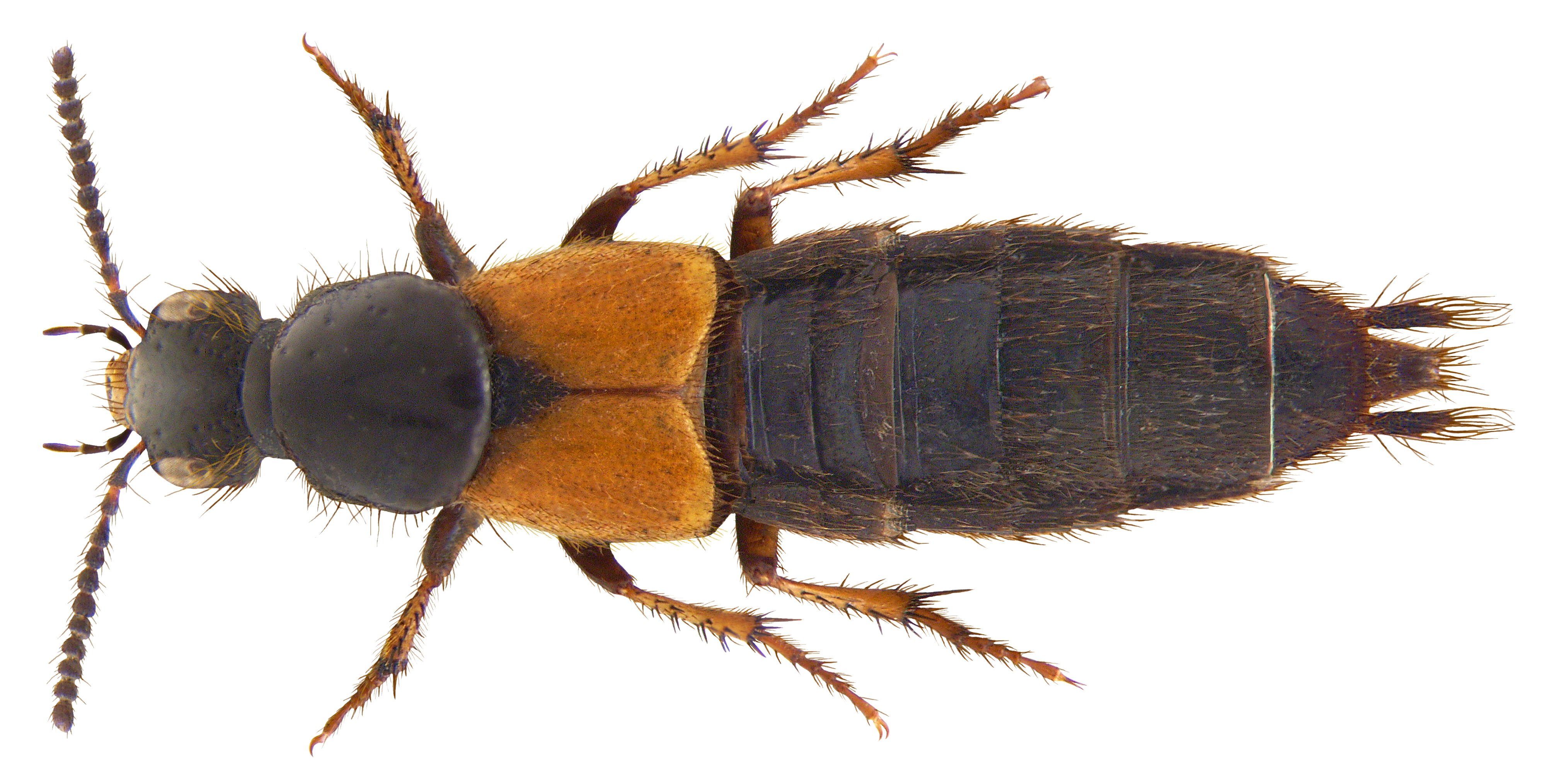 Familie: Staphylinidae Groesse: 13-18 mm Verbreitung: Europa, Asien Fundort: Italien, Adria, Bibione leg.det. U.Schmidt, 1996 Photo: U.Schmidt, 2009